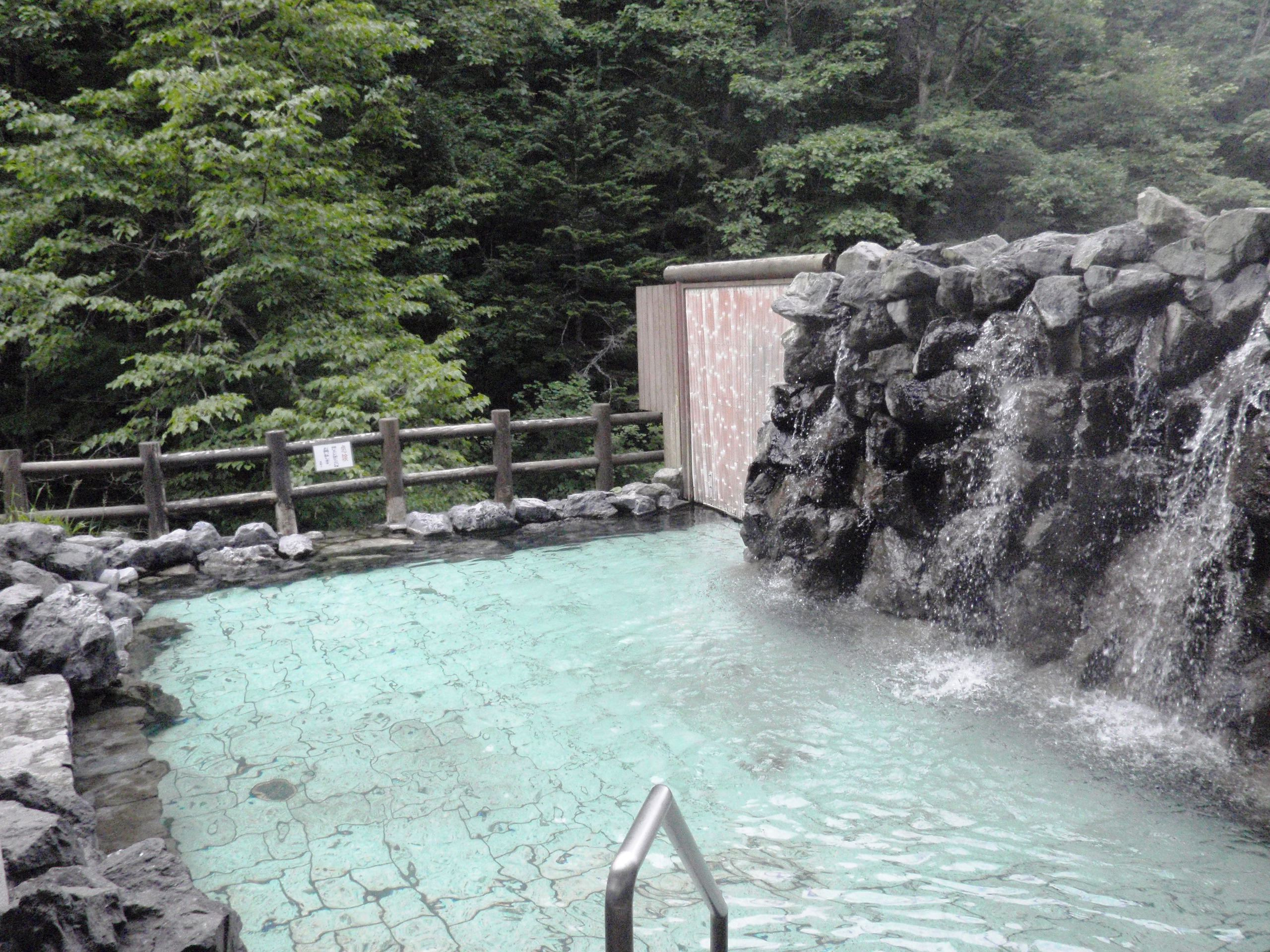 トムラウシ温泉、東大雪荘の露天風呂